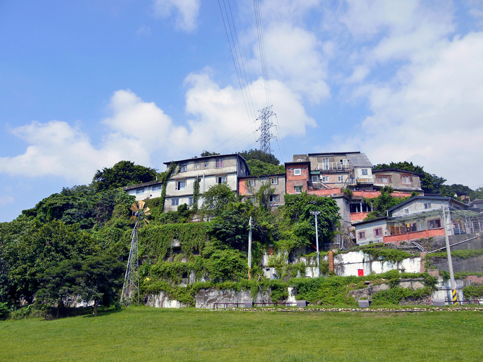 中文（台灣）: 寶藏巖聚落。